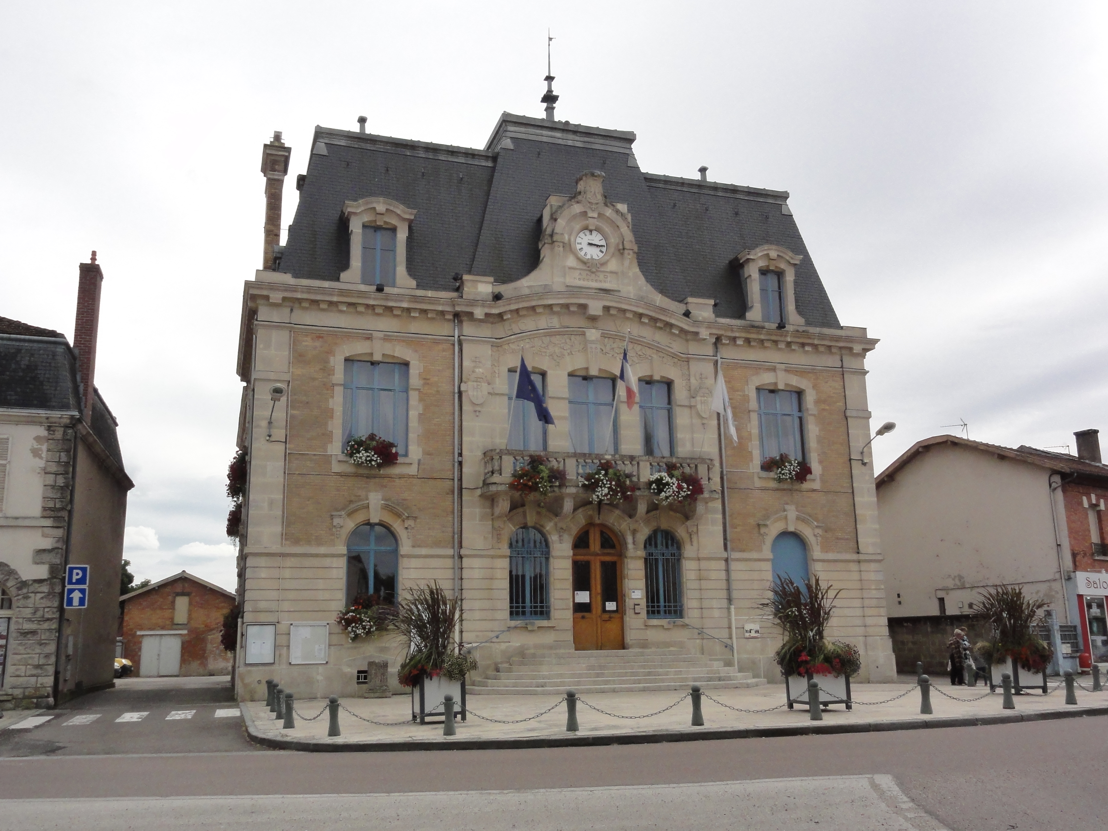 Revigny-sur-Ornain (Meuse) mairie